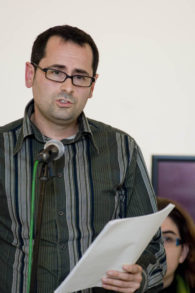 Còdols, la Biennal de poesia Catalana : Dimecres 24 d’octubre de 2007, “Poetes joves amb premis grans”. Còdols reuneix Núria Martínez-Vernis, Jordi Valls i Àngels Gregori en un recital presentat per Víctor Sunyol. Al Museu d’Art de Cerdanyola Can Domènech, a Cerdanyola del Vallès, a les 8 del vespre.